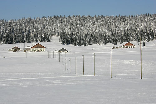 Vallée de la Brévine